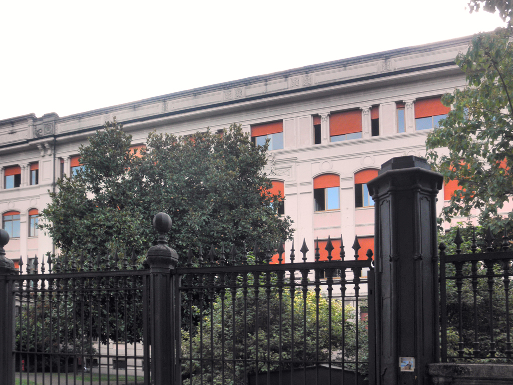 L'ex collegio Cazzulani a Lodi, ora scuola media